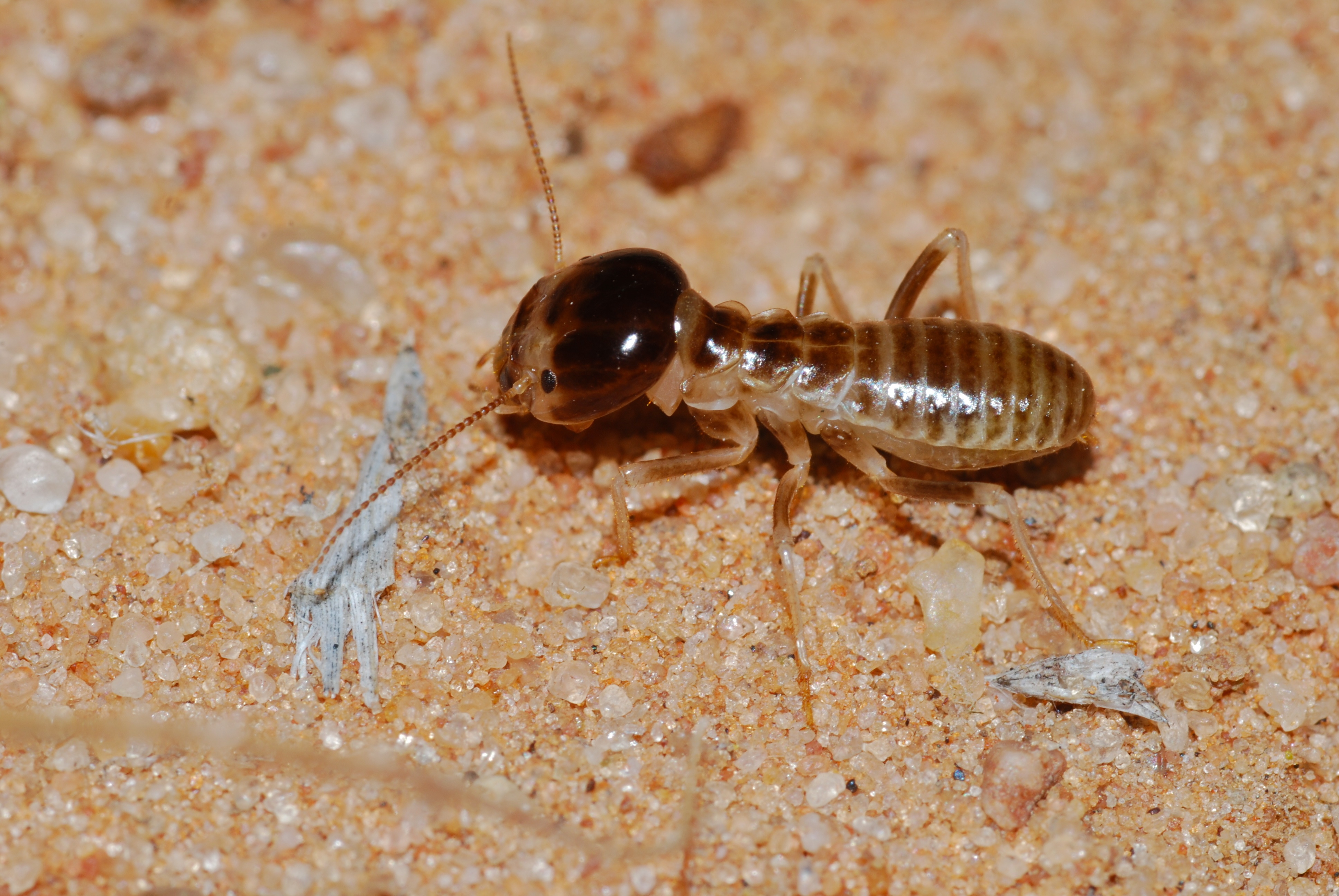 Mata-Mata Camp, Kgalagadi Transfrontier Park, SOUTH AFRICA